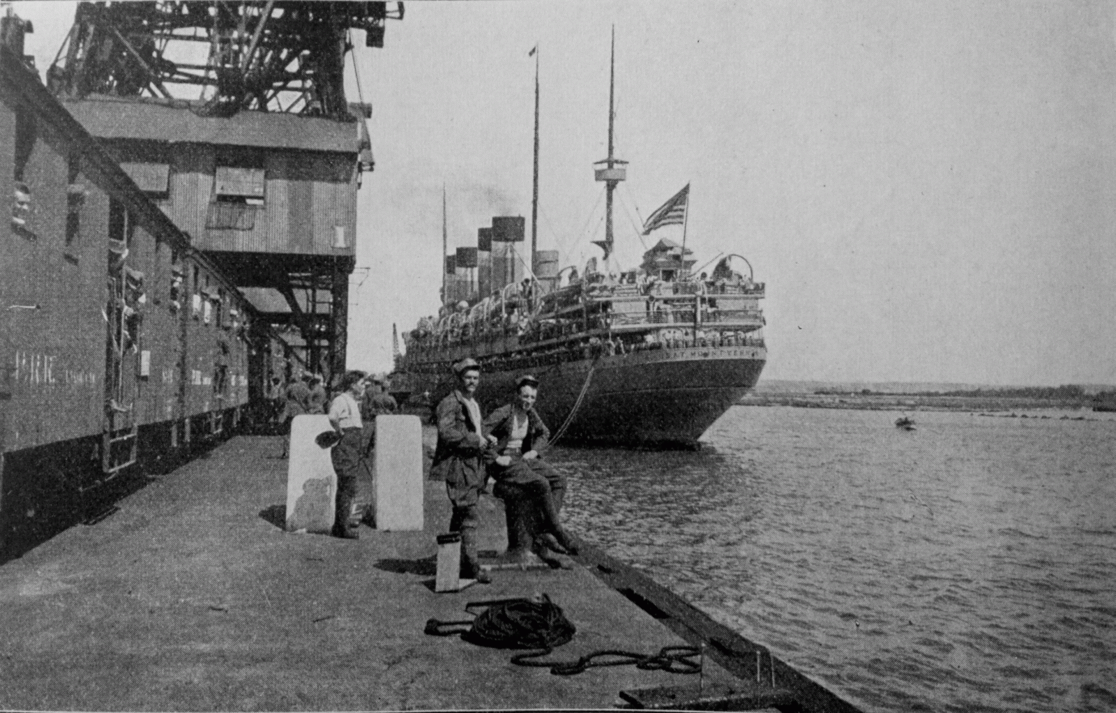 Americká (původně však německá) loď Mount Vernon - jedna z transportních lodí, jimiž byli přepravování českoslovenští legionáři z přístavu ve Vladivostoku zpět do vlasti. Speciálně tato loď realizovala v roce 1920 v pořadí 20. transport příslušníků československých legií z Vladivostoku (odplutí 13. dubna 1920) do Terstu (připlutí 6. června 1920), při němž bylo přepraveno cca 2990 důstojníků a vojáků (dle jiných pramenů to bylo celkem 3452 osob + 699 německých, maďarských a rakouských zajatců s americkou strážní rotou).